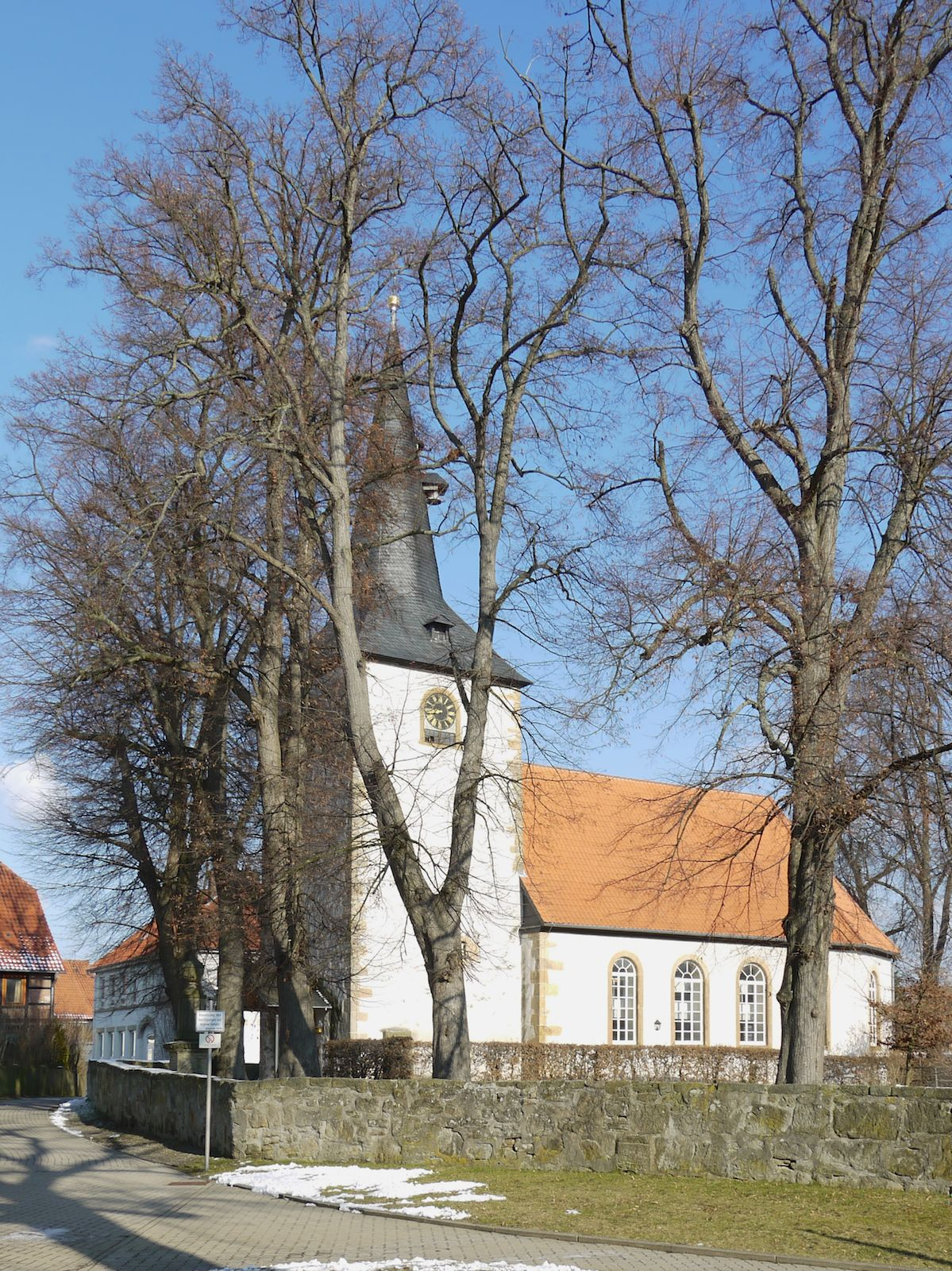 Dorfkirche der Gemeinde Sehlde an der Innerste